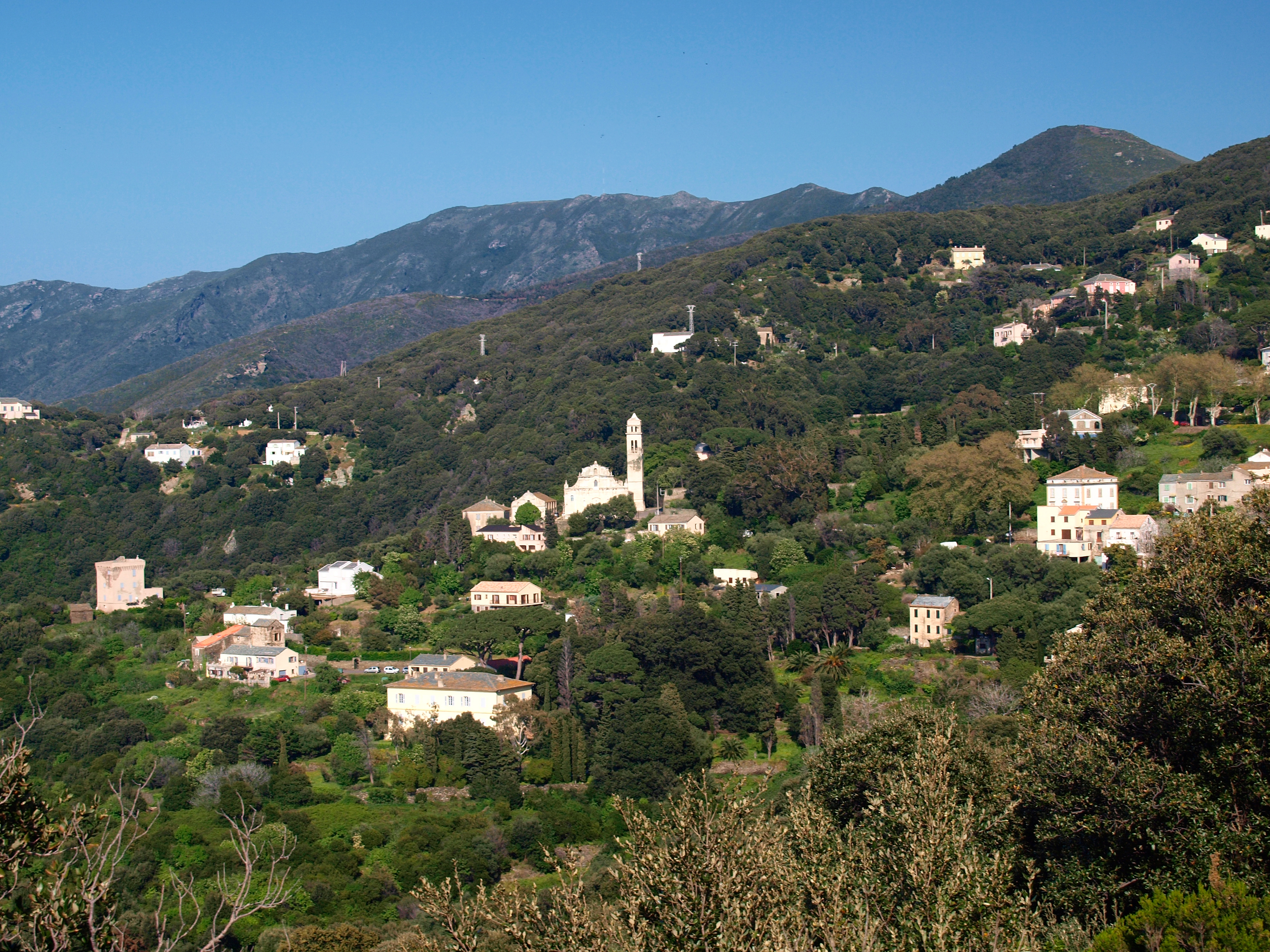 Pino (Corsica) - Vue du village